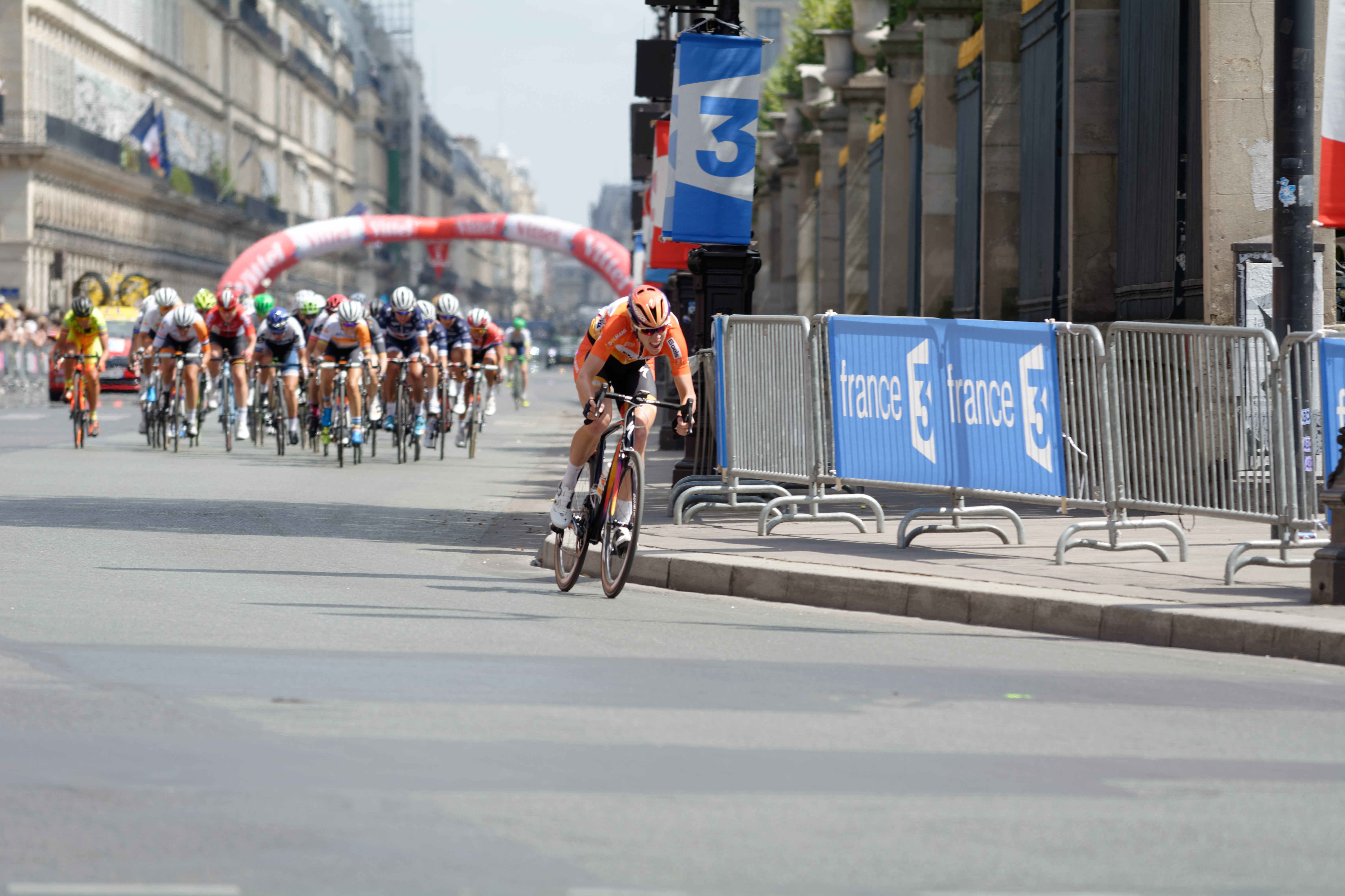 D71_9632_DxO